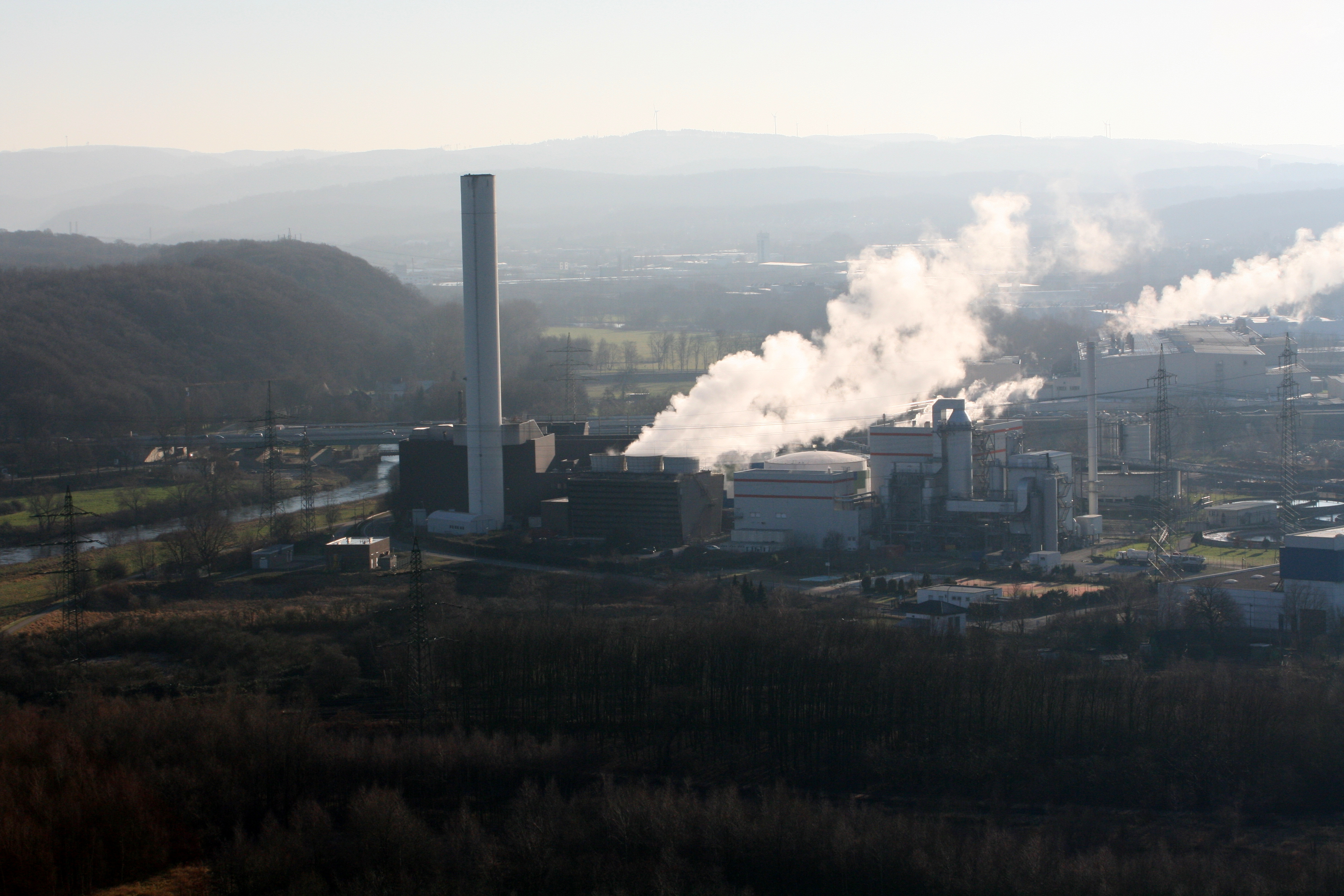 Heizkraftwerk Hagen-Kabel an der Ruhr, rechts dahinter die Papierfabrik Stora Enso Hagen, links die Lenne.